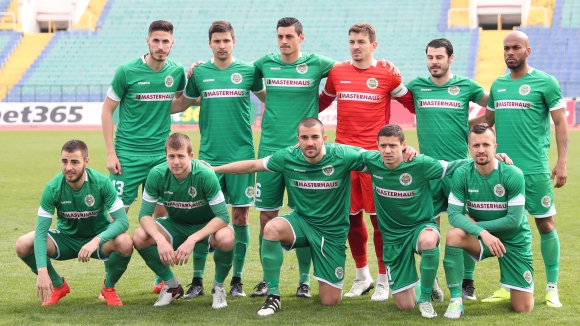 Neftohimik2016-2017